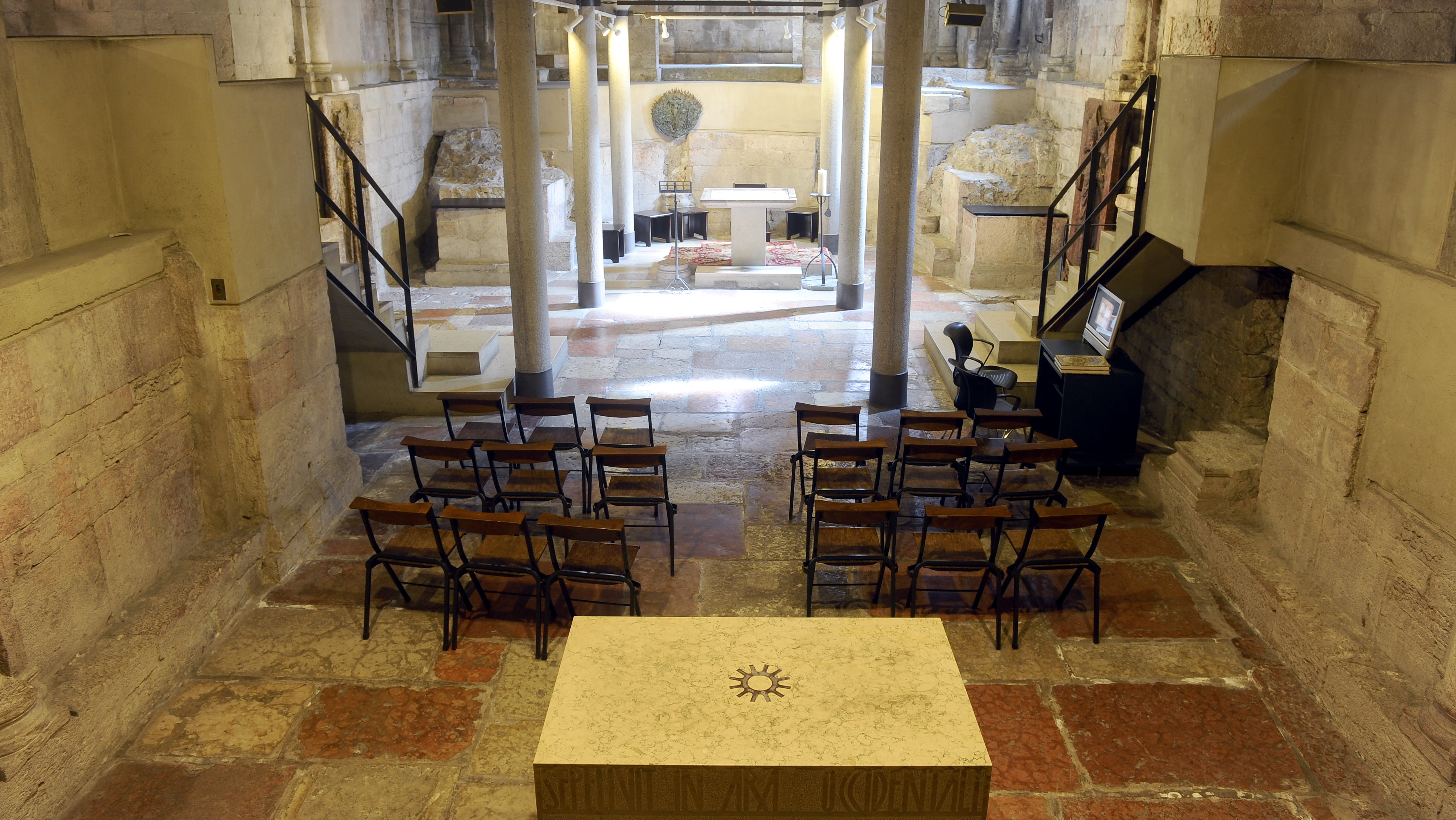 Basilica Paleocristiana di San Vigilio. La cripta. This is a photo of a monument which is part of cultural heritage of Italy.